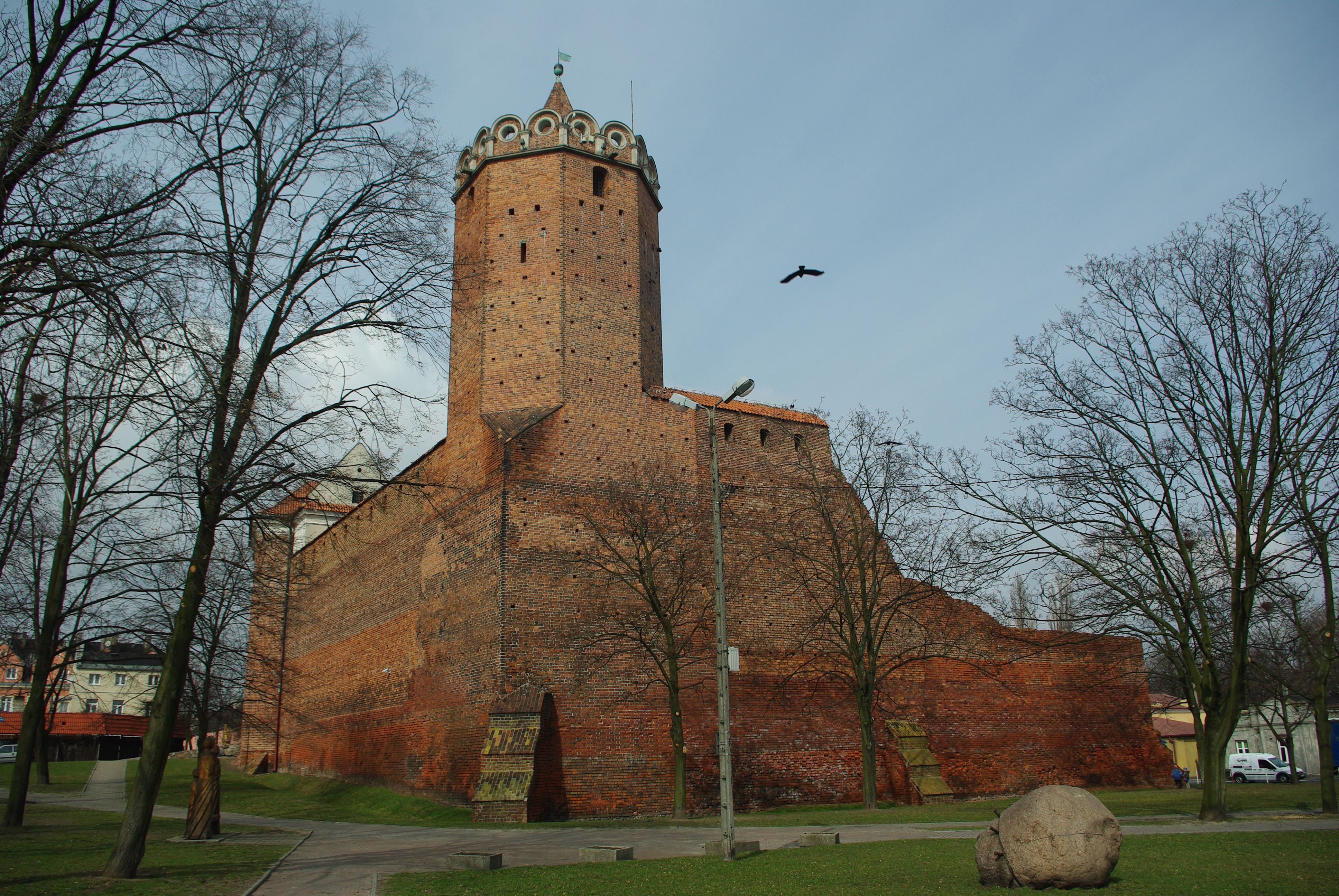 Widok na wieżę i mury XIV-wiecznego zamku w Łęczycy.